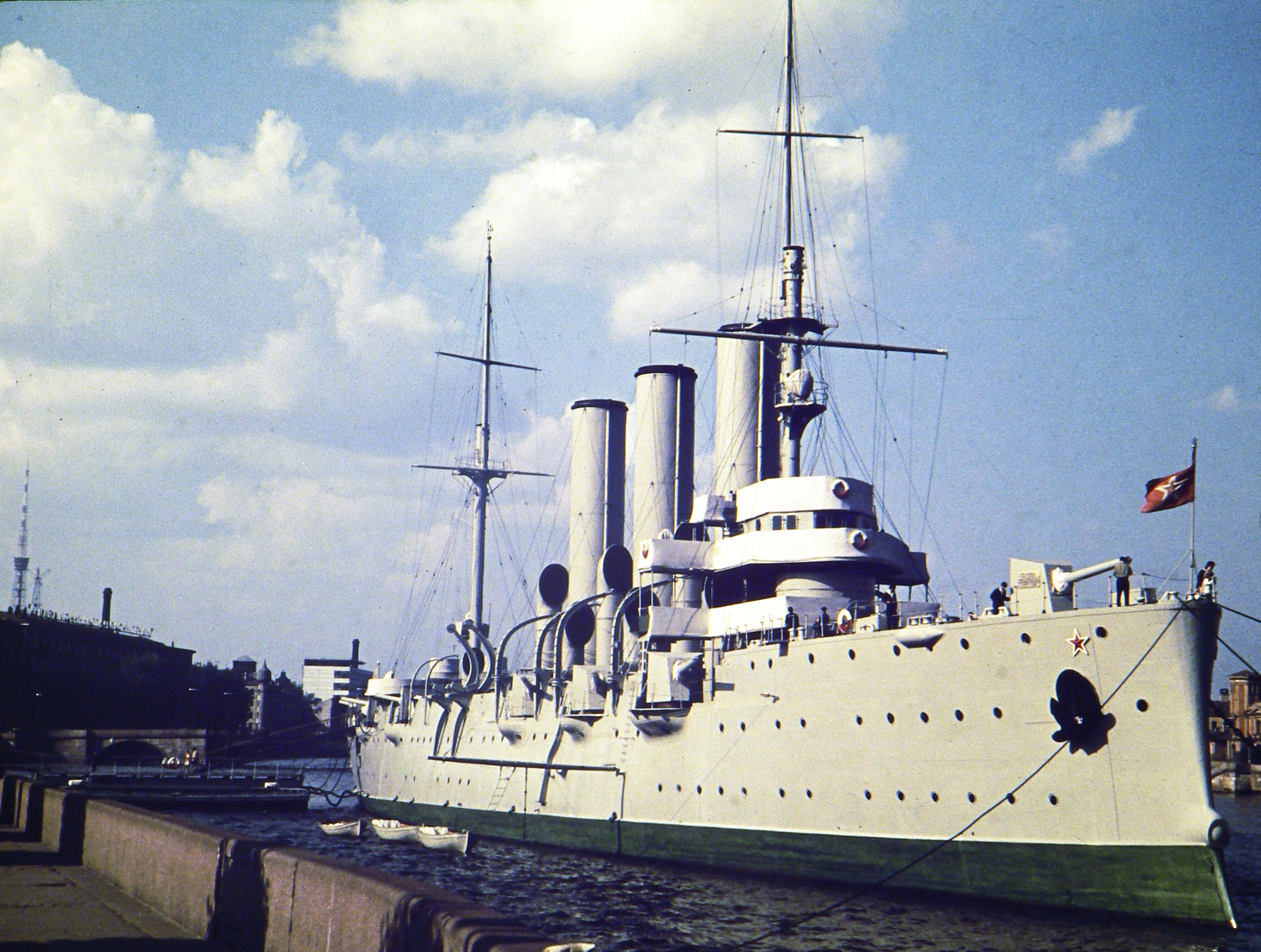 (Leningrád), Auróra cirkáló a Néva folyón. Location: Russia, St. Petersburg Tags: colorful, ship, warship, ordnance, flag, Soviet Union, Aurora-ship Title: (Leningrád), Auróra cirkáló a Néva folyón.